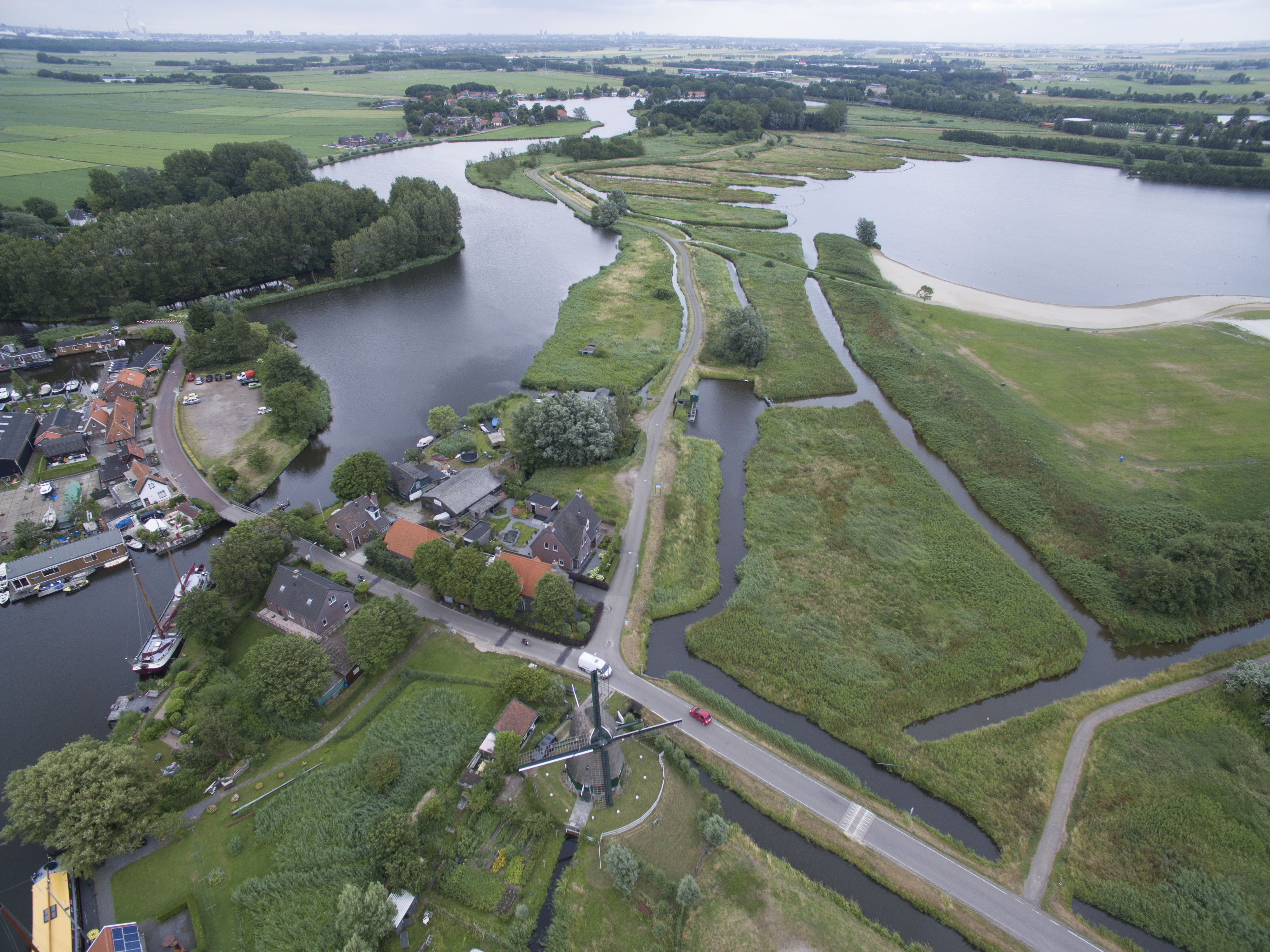 Penningveer in de Veerpolder Haarlem met de molen de Veer